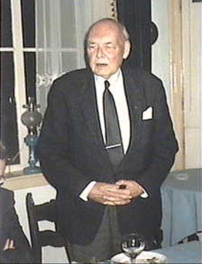 Diner promotie Ellen van Olst: G.J.A.Bouma kleur (opmerking: Deze afbeelding hebben wij helaas alleen in deze lage resolutie.)